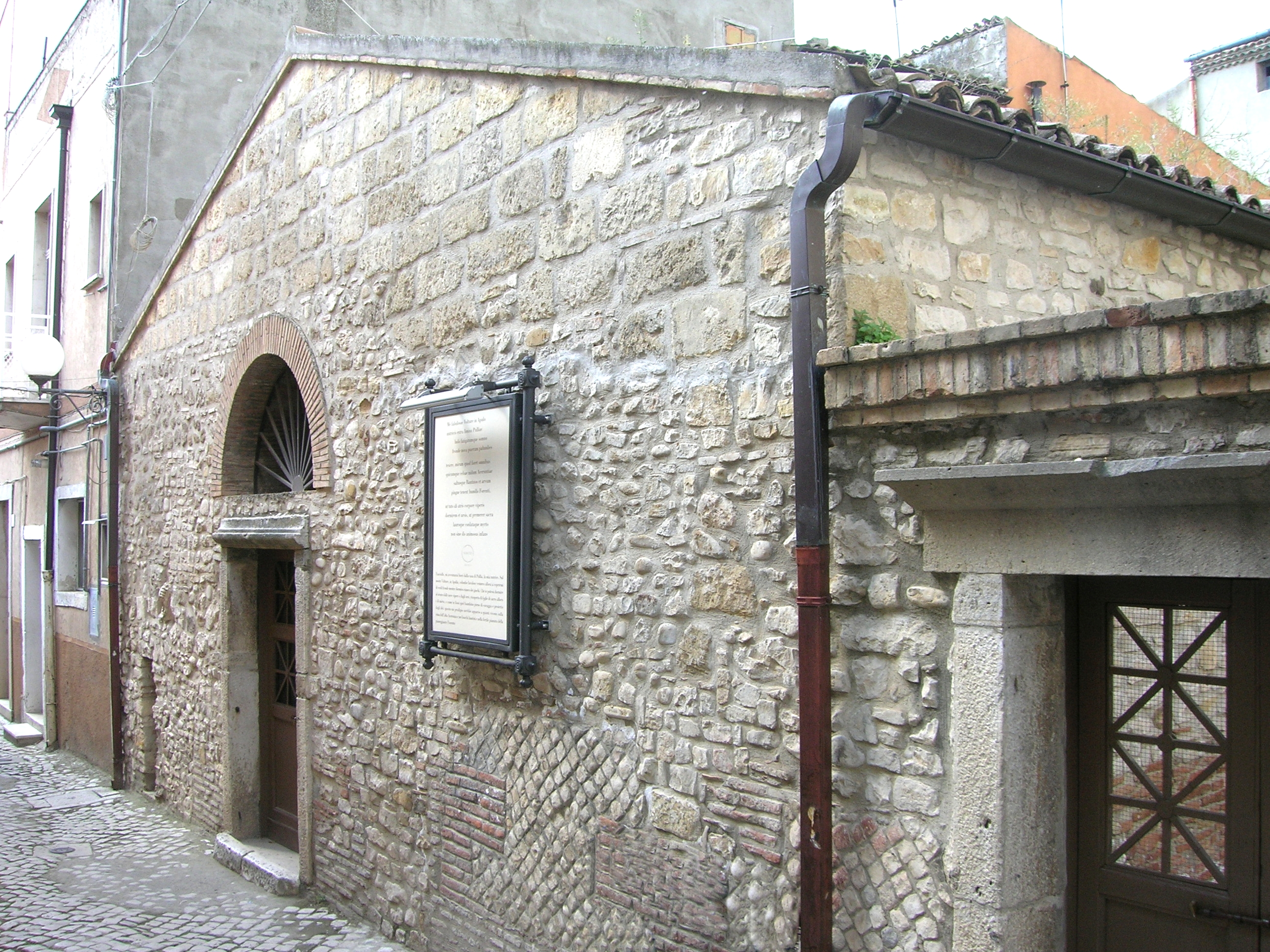 Cosiddetta casa di Orazio Flacco (in effetti trattasi dei resti di ambienti termali di una domus romana), Venosa (PZ)